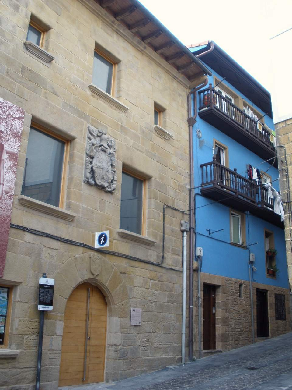 Orio (Gipuzkoa)